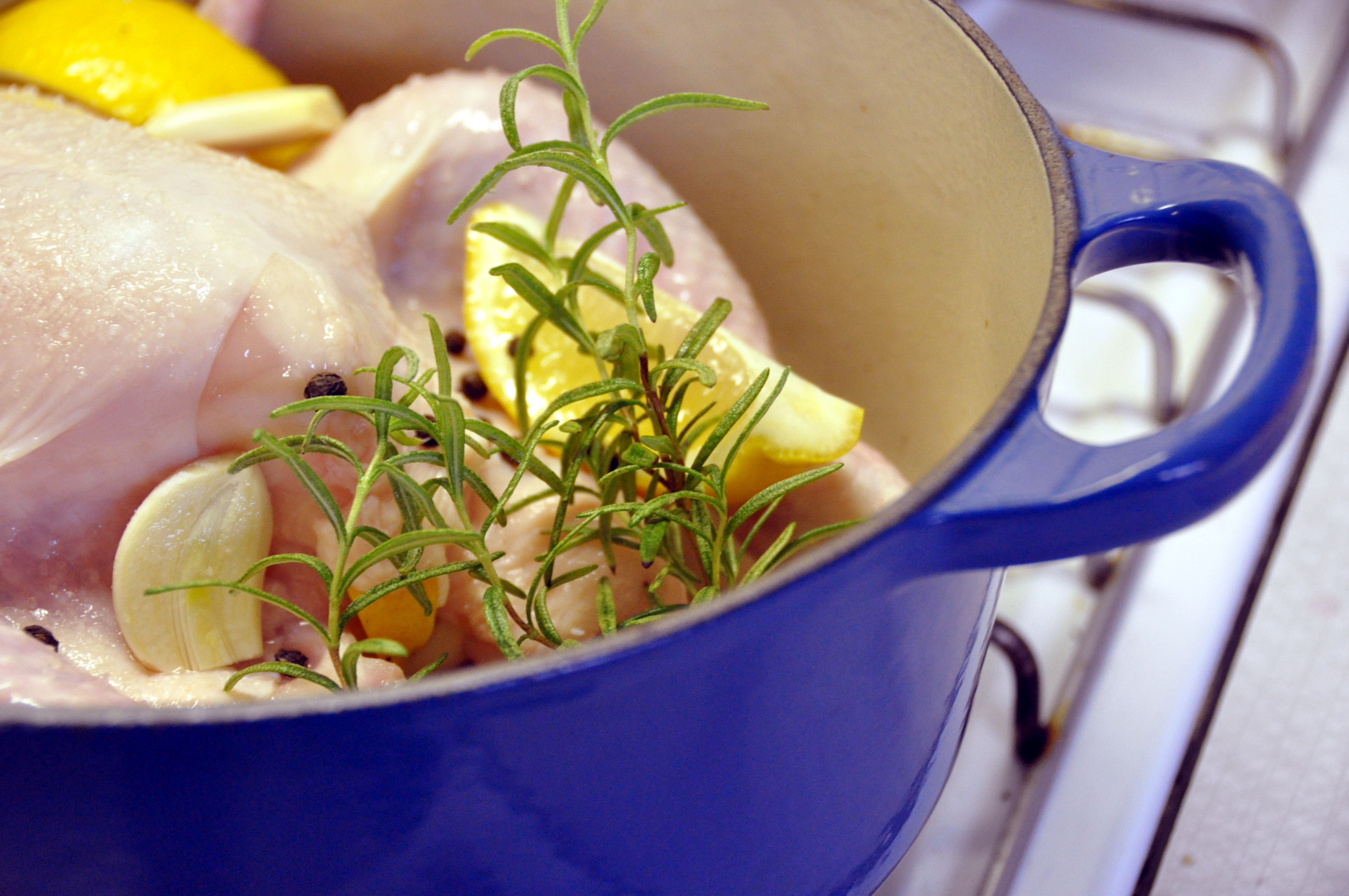 Kylling med hvidløg, citron, rosmarin og sort peber